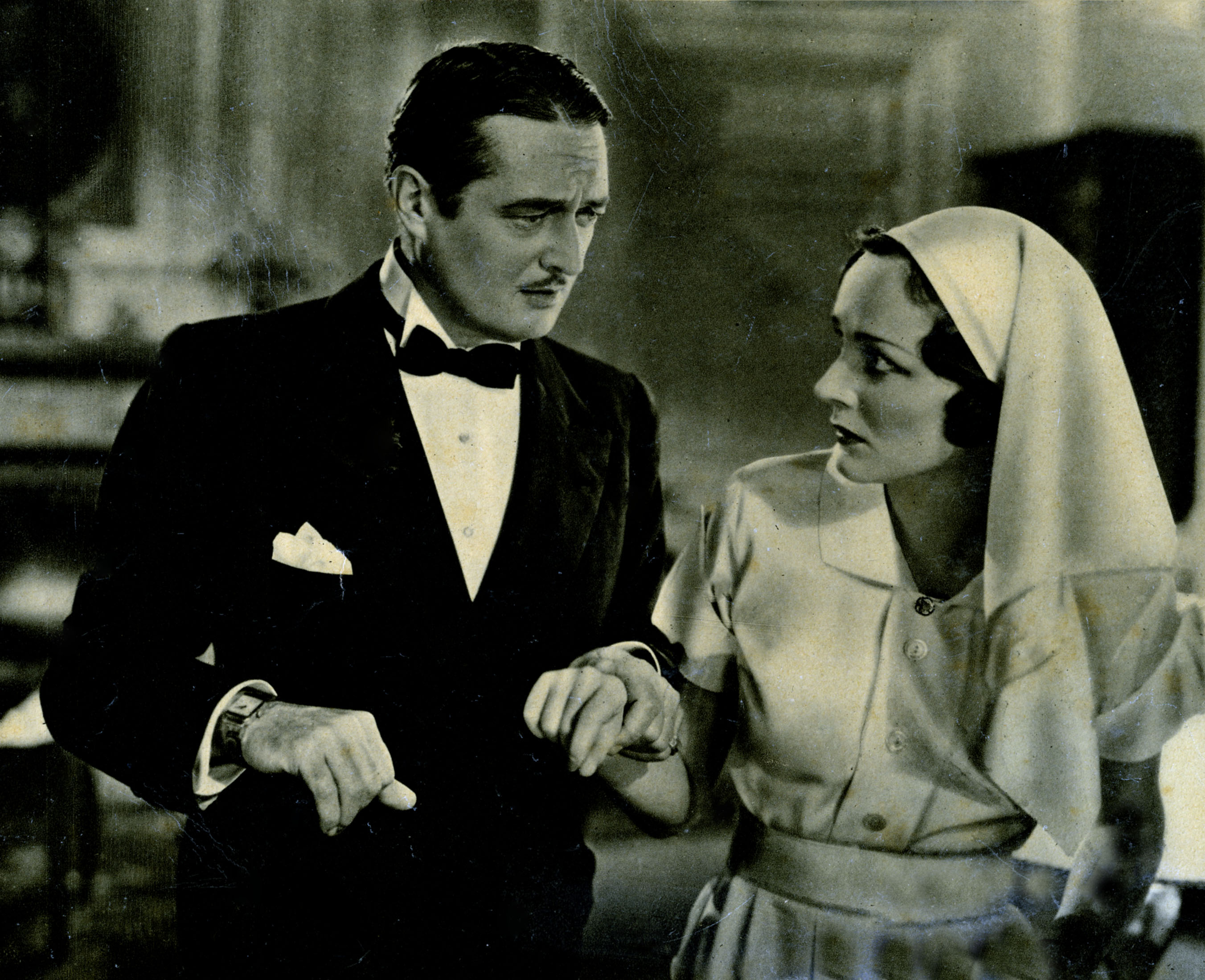 foto di scena film Volontà occulta